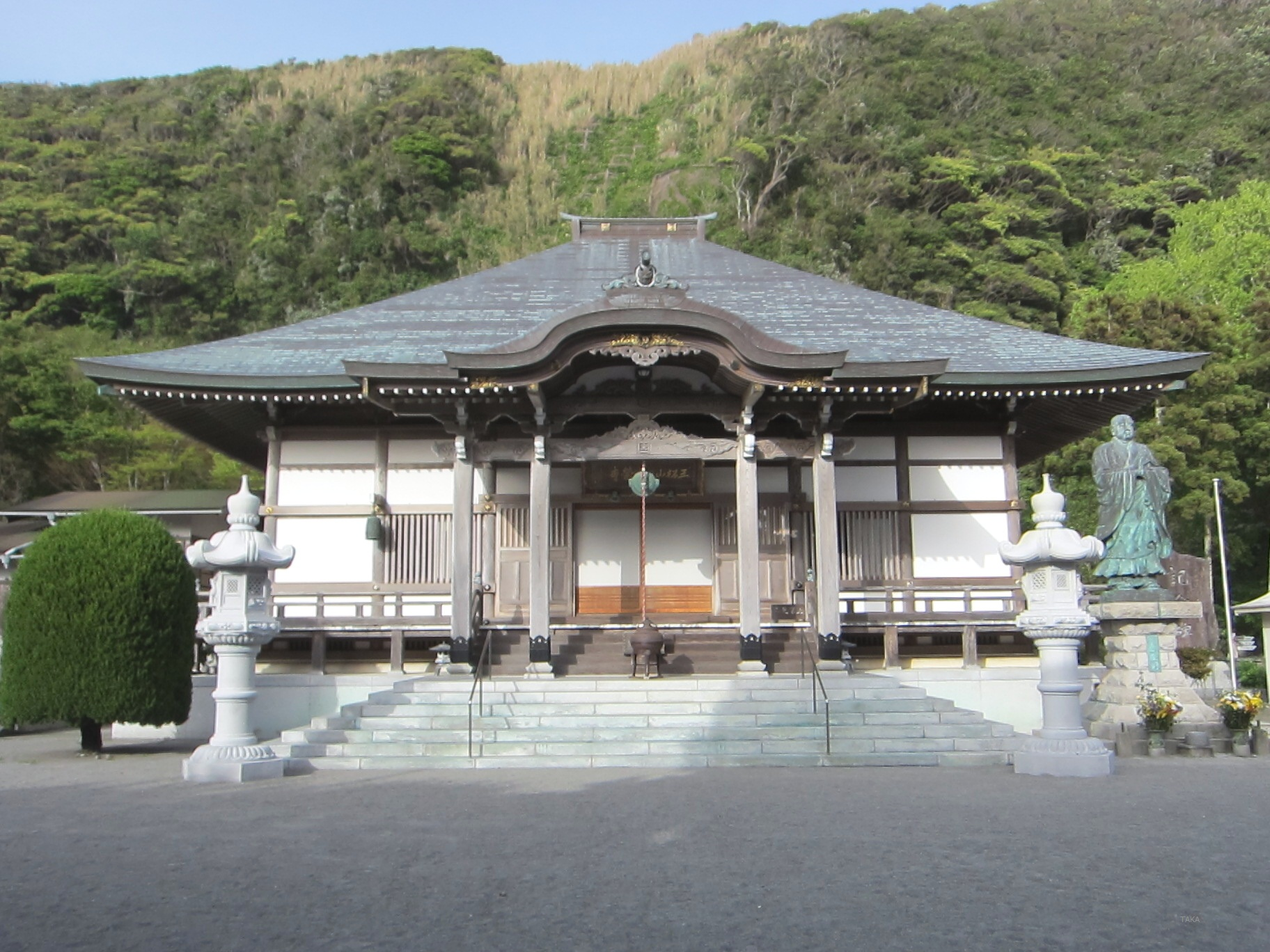 伊豆七島新島、日蓮宗三松山長榮寺